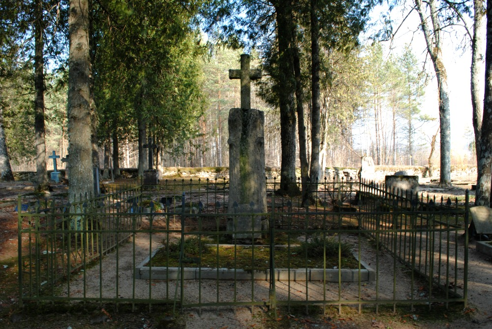 Piemineklis sešiem cīņās pret landsvēru kritušajiem 5.Cēsu kājnieku pulka karavīriem. Atrodas Jaunraunas kapsētā.